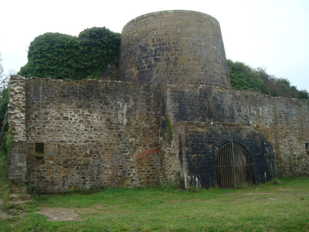 Four à chaux de Rozan sur l'Aber de Crozon, Finistère, France